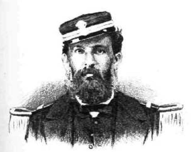 Griechischer Politiker, 19. Jahrhundert